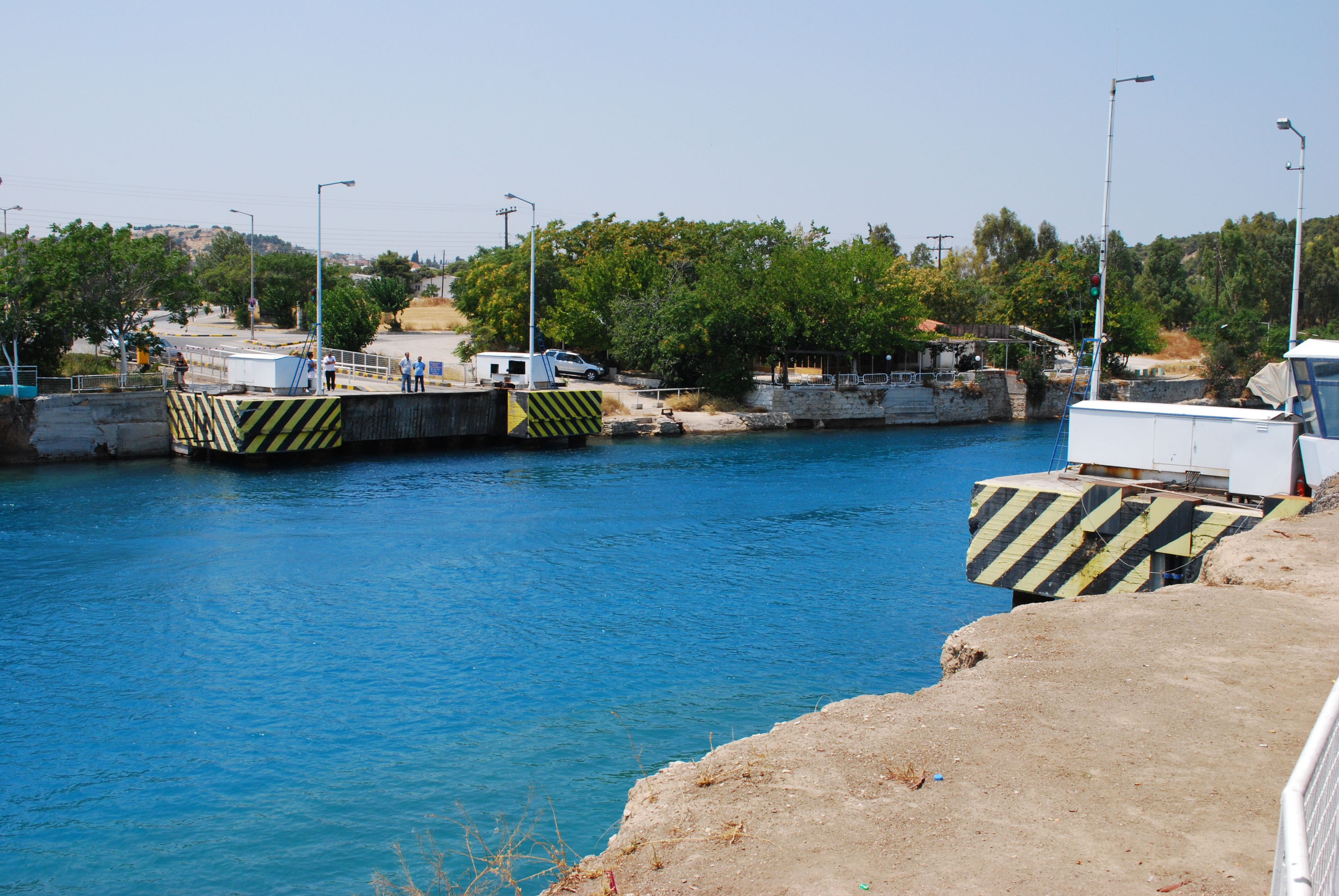 Le canal de Corinthe en Grèce en juillet 2009.